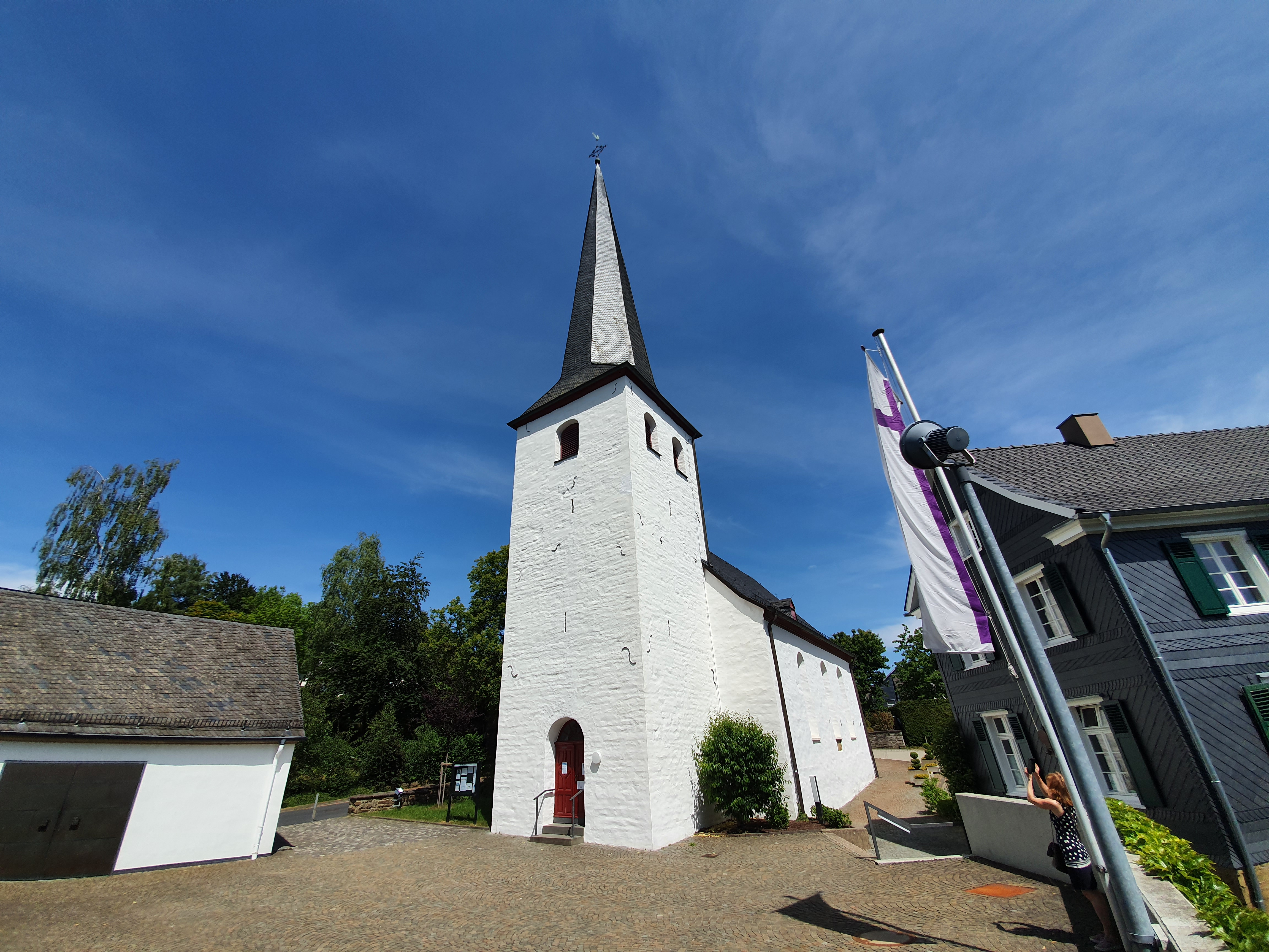 Westturm der evangelischen Kirche der Gemeinde Ruppichteroth in Nordrhein-Westfalen.